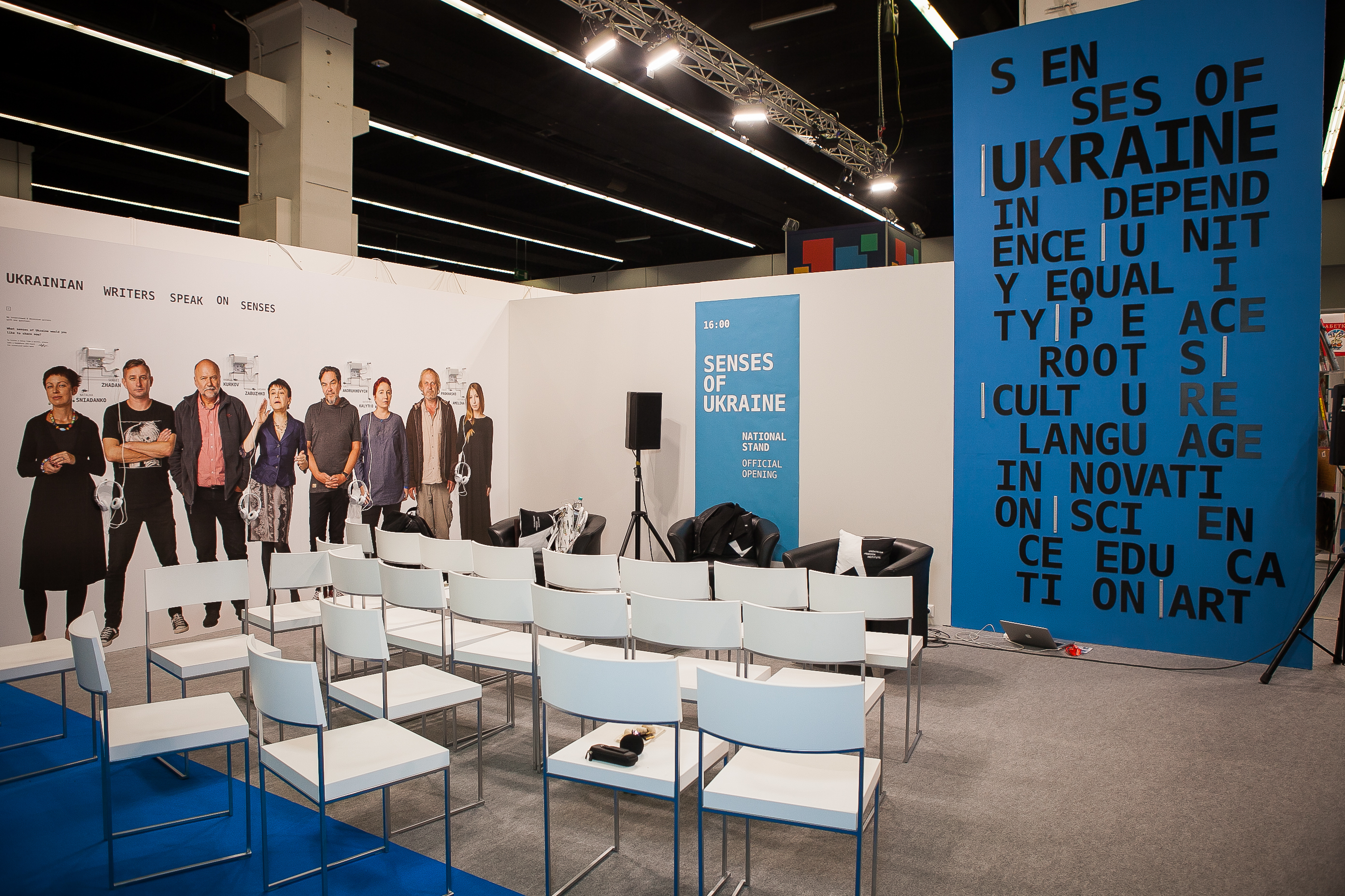 Стенд України на Франкфуртському книжковому ярмарку - 2018